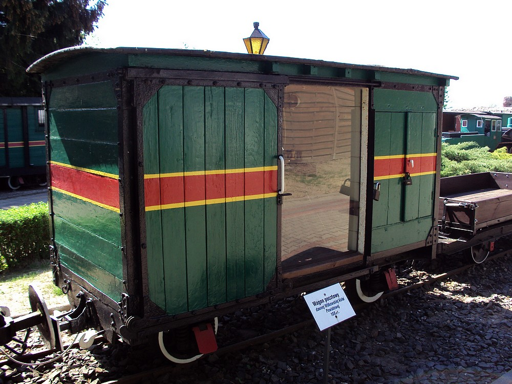 Wagon pocztowy dawnej Witkowskiej Kolei Powiatowej